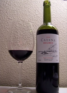 Copa de vino de mendoza